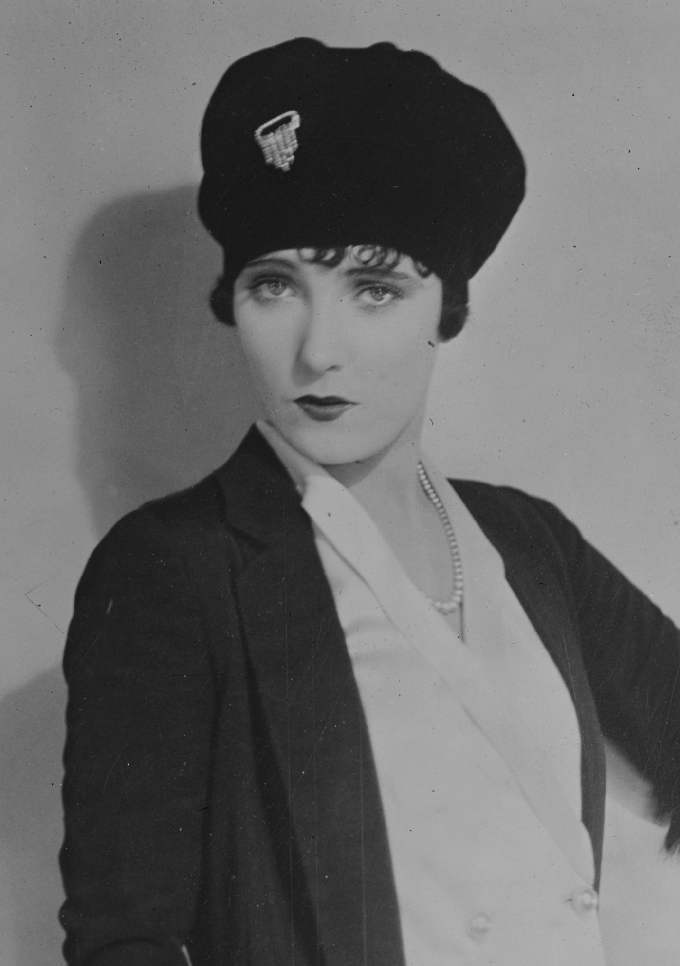 Actress Pauline Starke